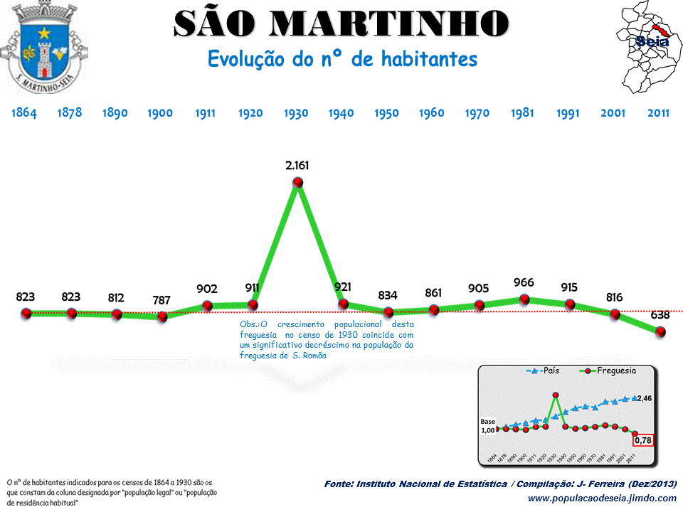 Evolução da População 1864 / 2011